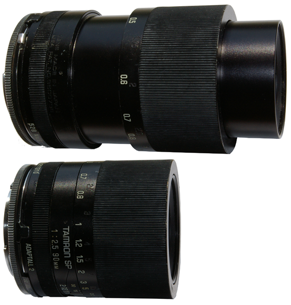 Objectif "macro" (Tamron-SP 90 mm F/2,5). Le tirage important, permettant une mise au pont à 40 cm et un rapport de reproduction de 1:1, est obtenu grâce à une double rampe hélicoïdale.